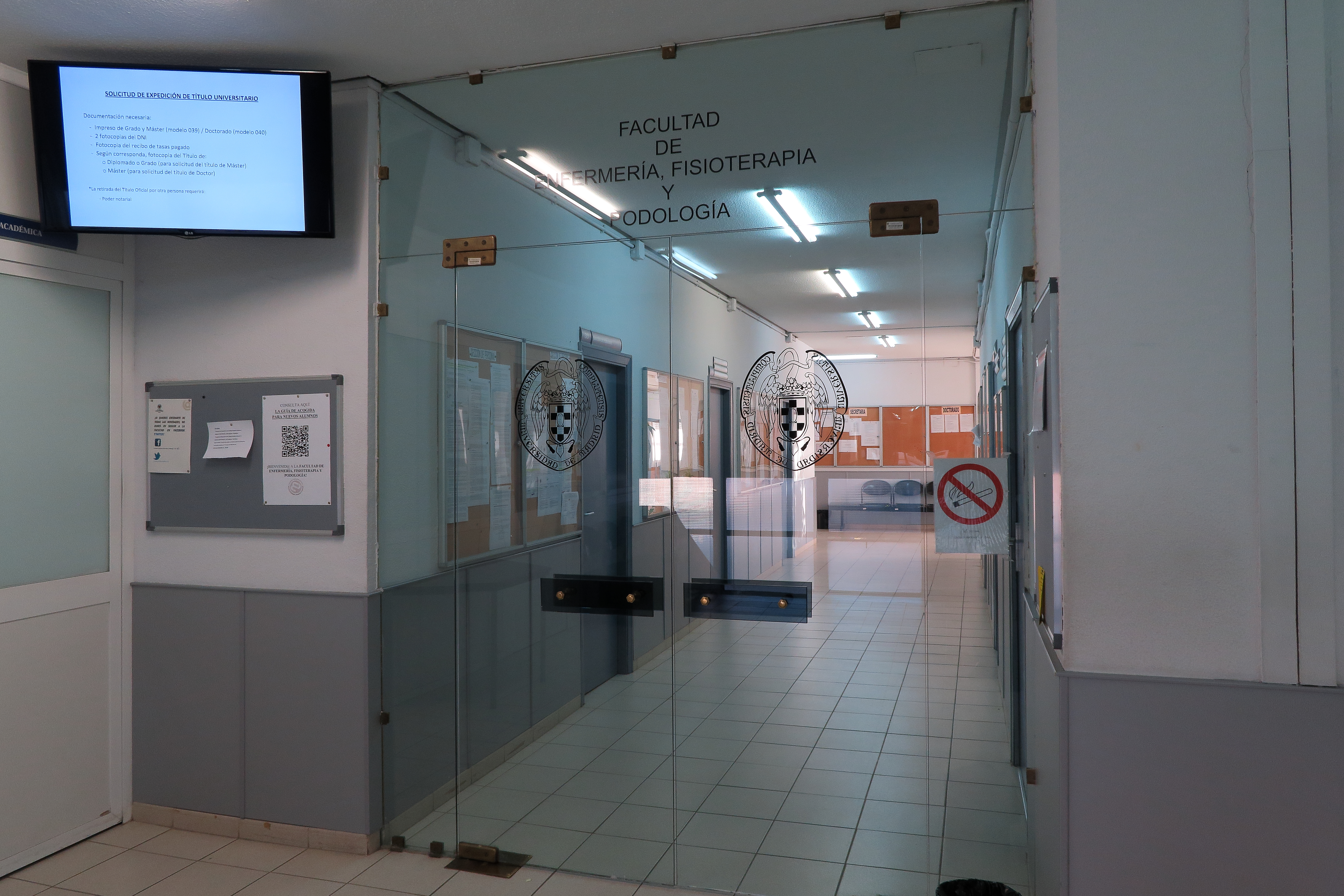 Facultad de Enfermería, Fisioterapia y Podología, en la 3ª planta del pabellón central de la facultad de Medicina